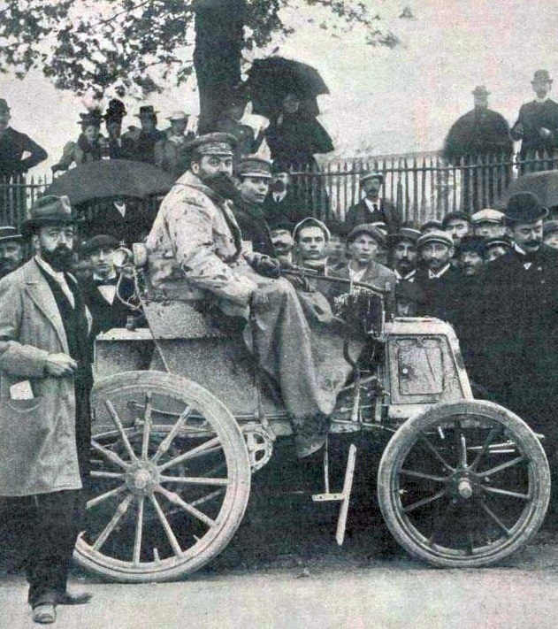 René de Knyff, vainqueur du Critérium des Entraîneurs 1898 sur Panhard 6 hp (à Bordeaux, mécanicien embarqué l'habituel Aristide) - La Vie au Grand Air du 15 mai 1898, p.53 (et Panajou)